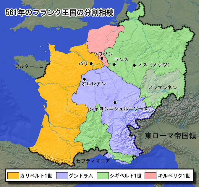 561年のフランク王国の分割相続。